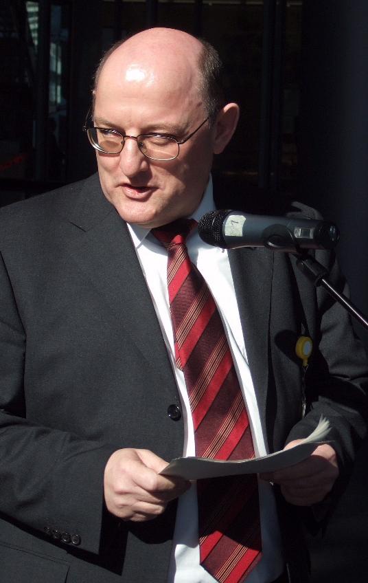 Walter Scheurle (Vorstand Deutsche Post AG) Urheber = Hans Weingartz